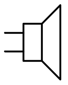 Valjuhääldi